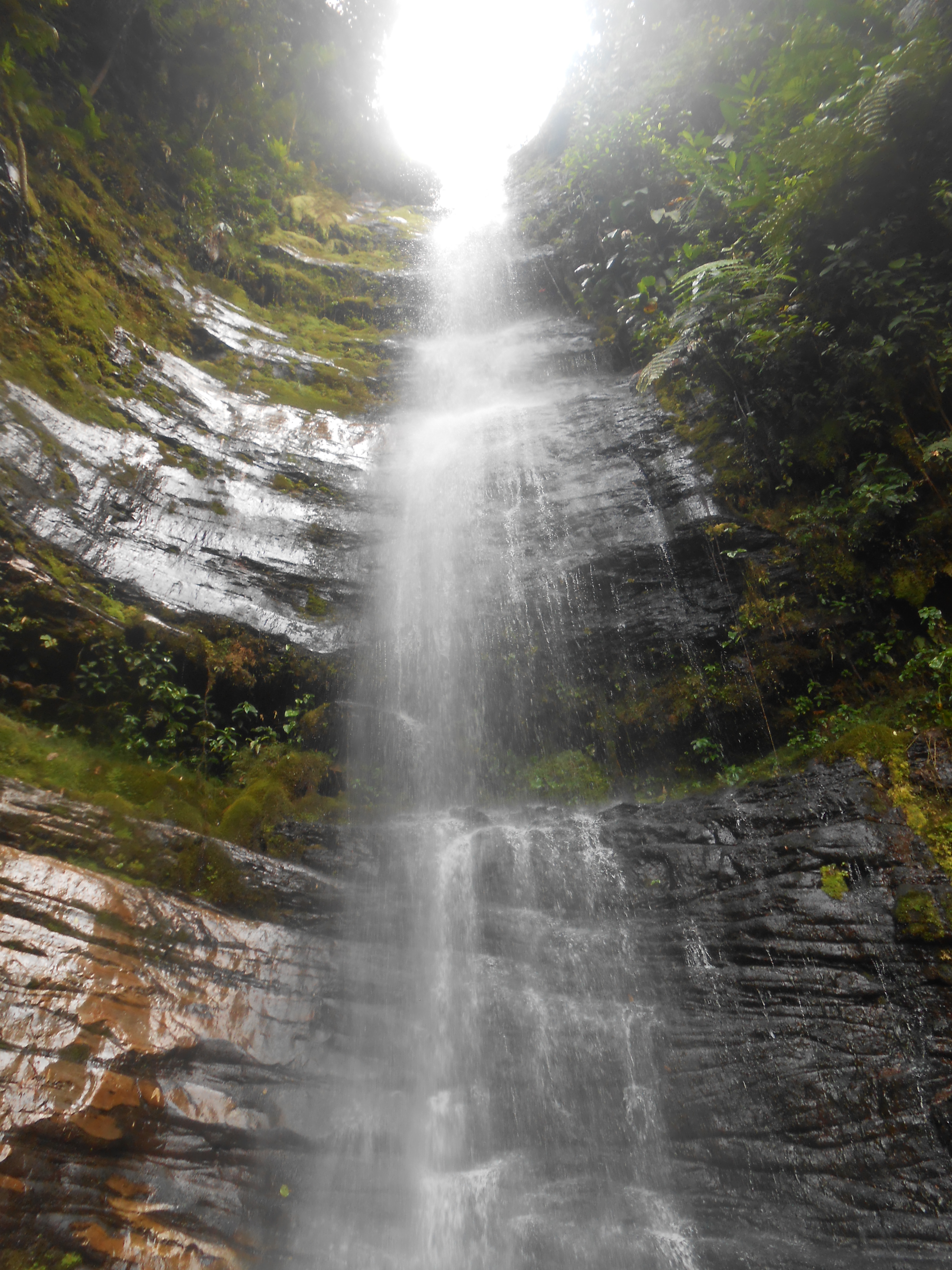 Esta fotografía fue tomada en el municipio colombiano con código 15897.